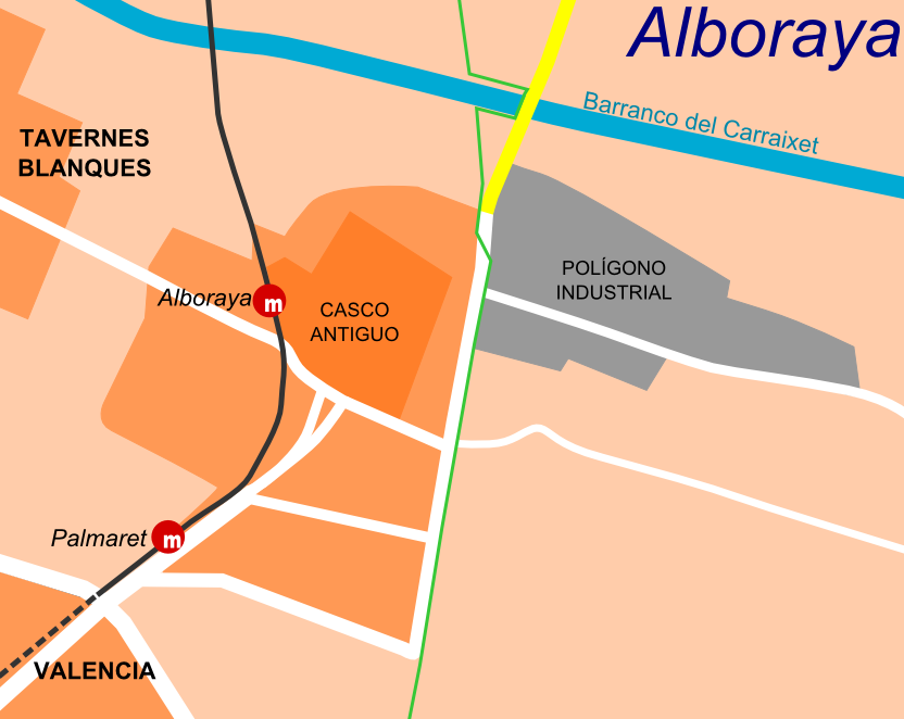 Accesos de Alboraya